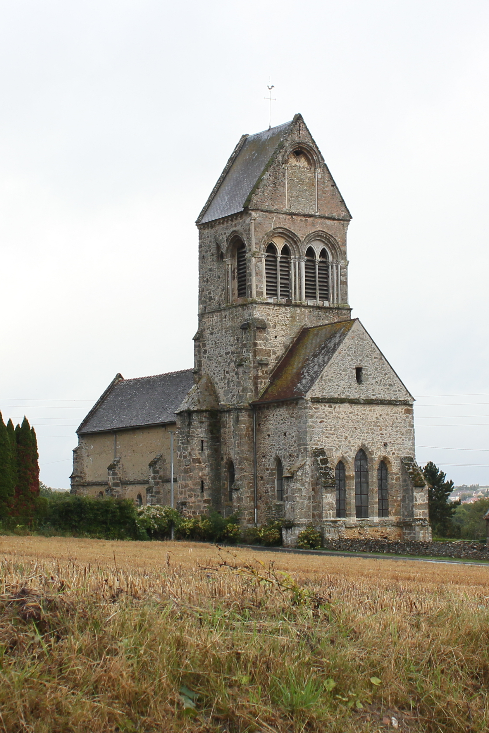 Église Notre-Dame de Corribert, (Classé, 1979) .